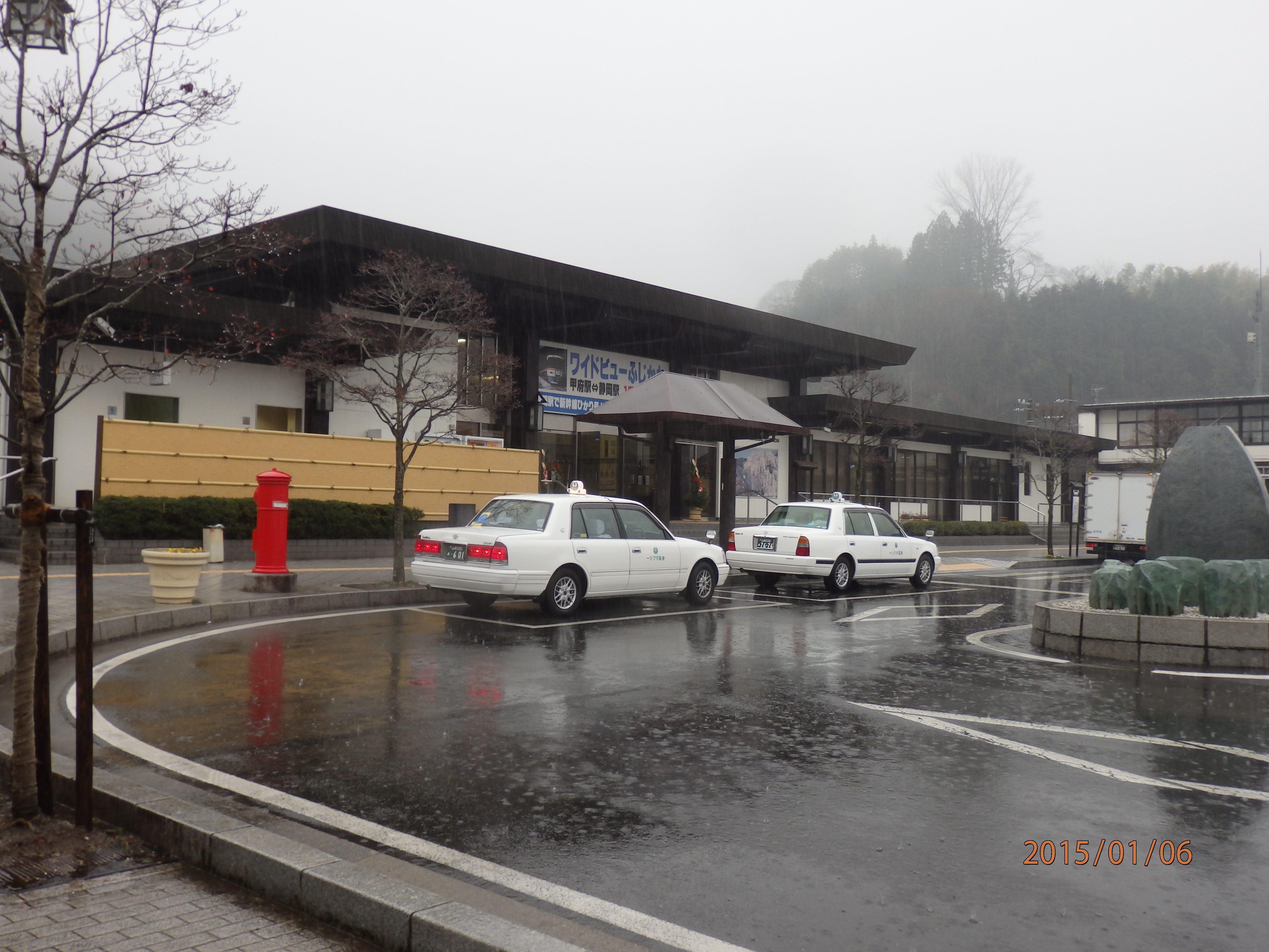 身延駅舎（201５年1月）